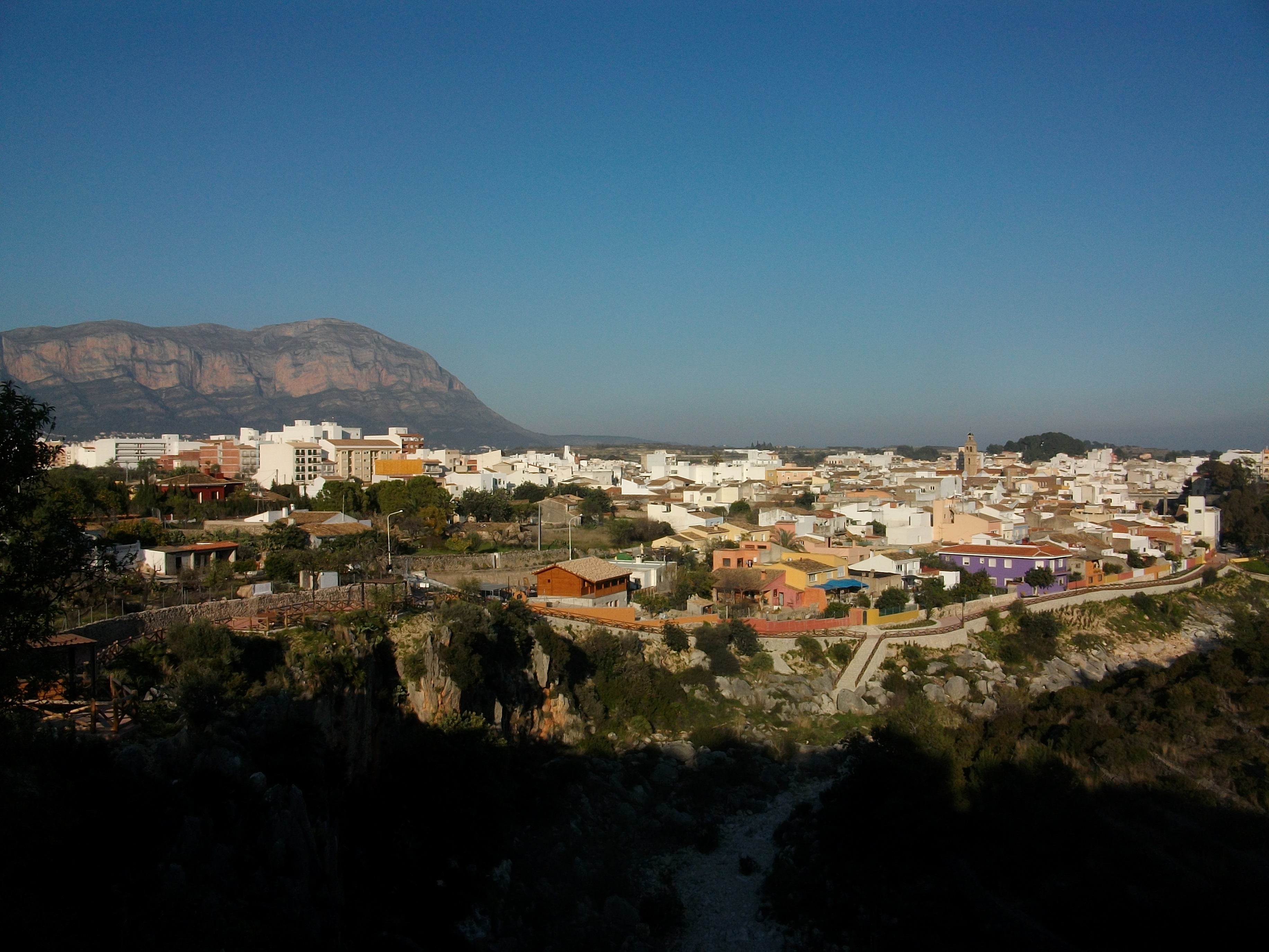 Gata de Gorgos des de les Coves Roges. Marina Alta, País Valencià.